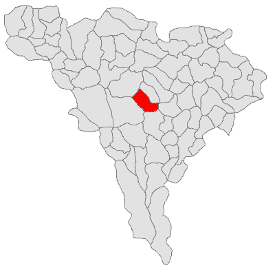 Categorie:Hărţi ale judeţului Alba